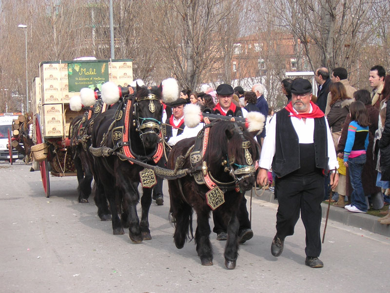 Festa dels Tres Tombs. Sant Cugat 22/1/2006